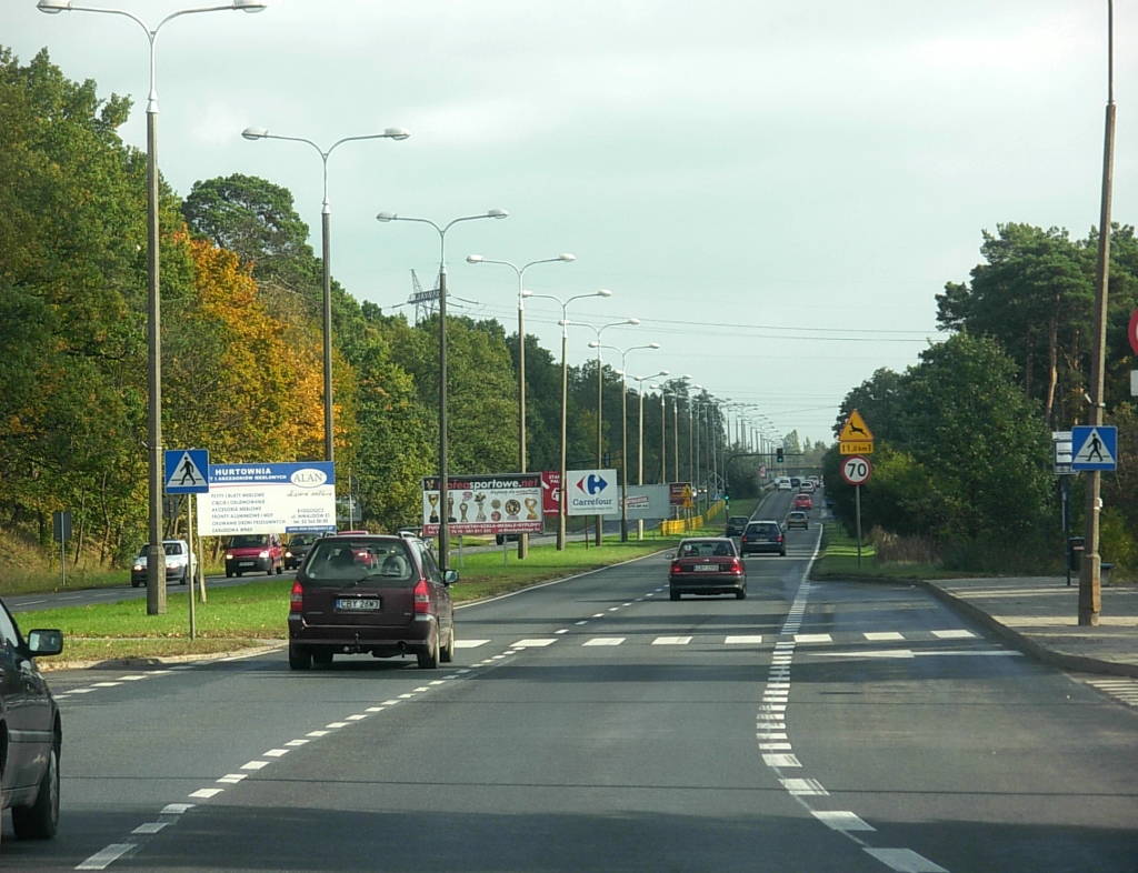 Ulica Fordońska w Bydgoszczy - zjazd z wiaduktów warszawskich w kierunku Fordonu